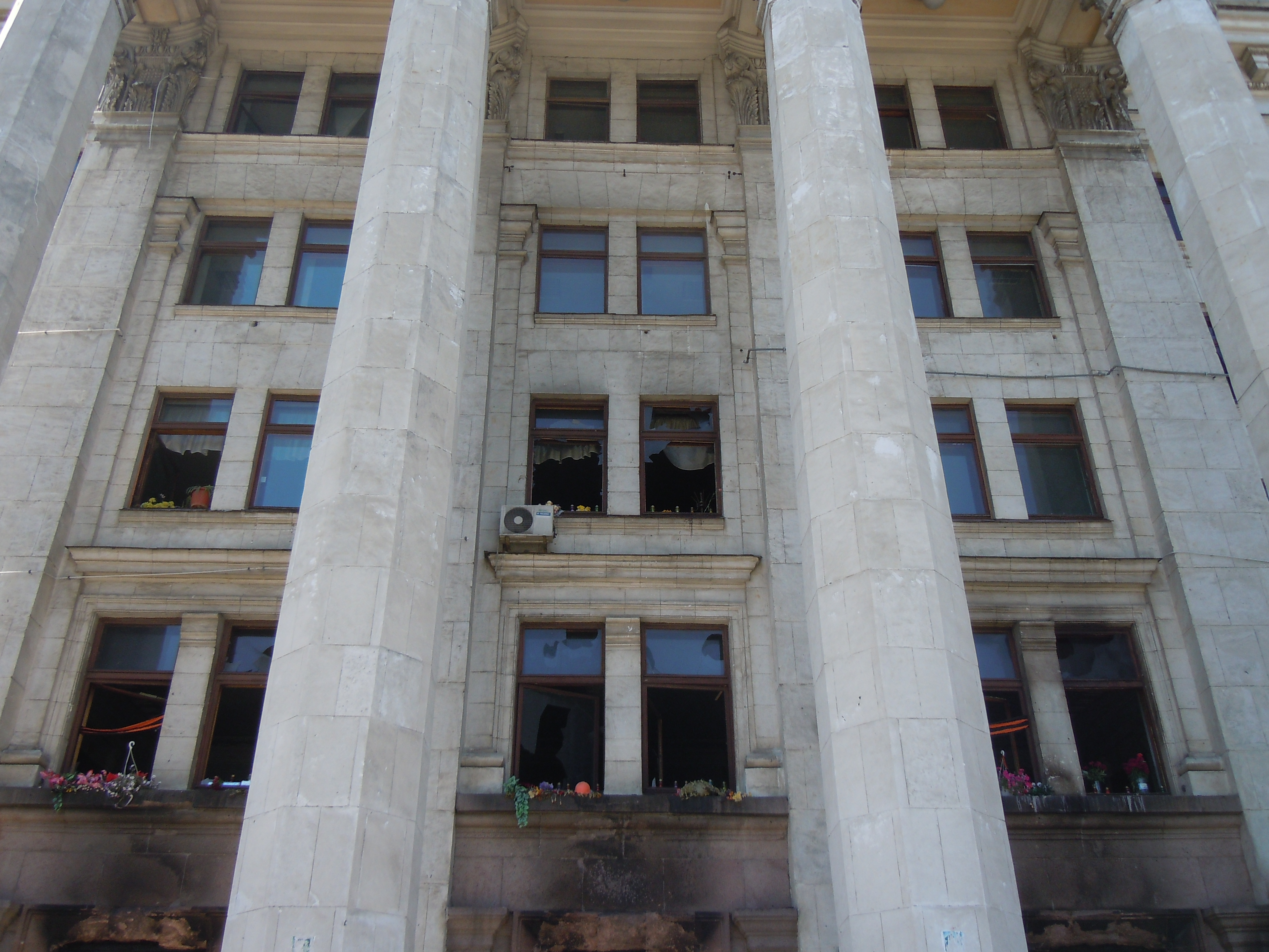 Будинок профспілок Одеської області після пожежі, Одеса, Куликове поле, 1